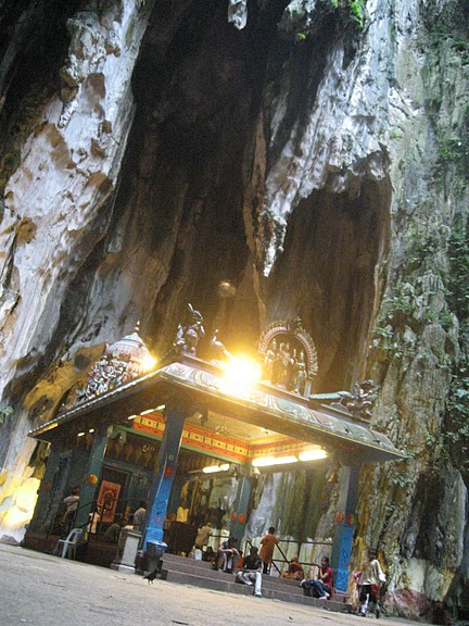 Batu Caves